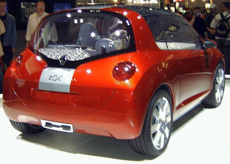 Fotografiert auf der AMI 2005 am 8. April in Halle 1 am Renault-Stand.